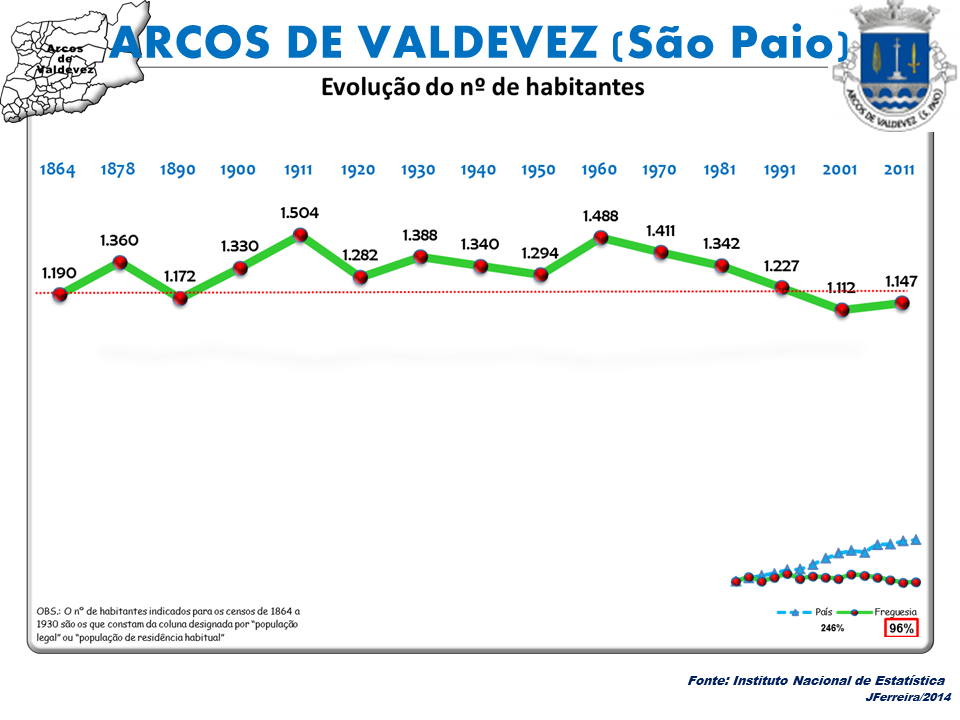 Censoa 1864/2011